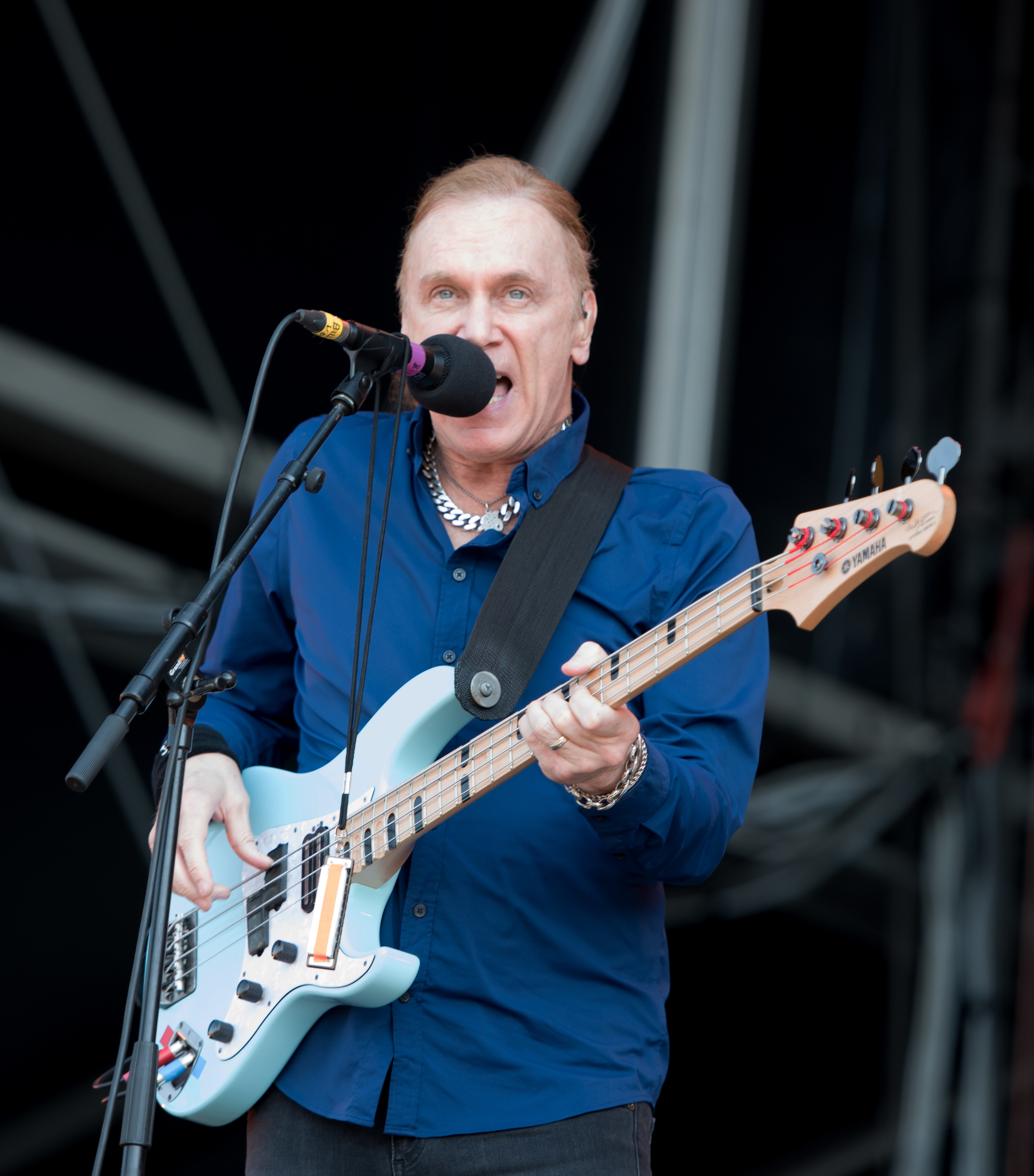 Mr. Big beim Wacken Open Air 2018